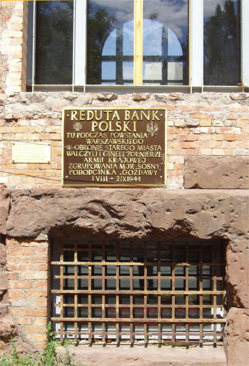 Reduta Bank Polski przy ul. Bielańskiej w Warszawie (fot Zu)